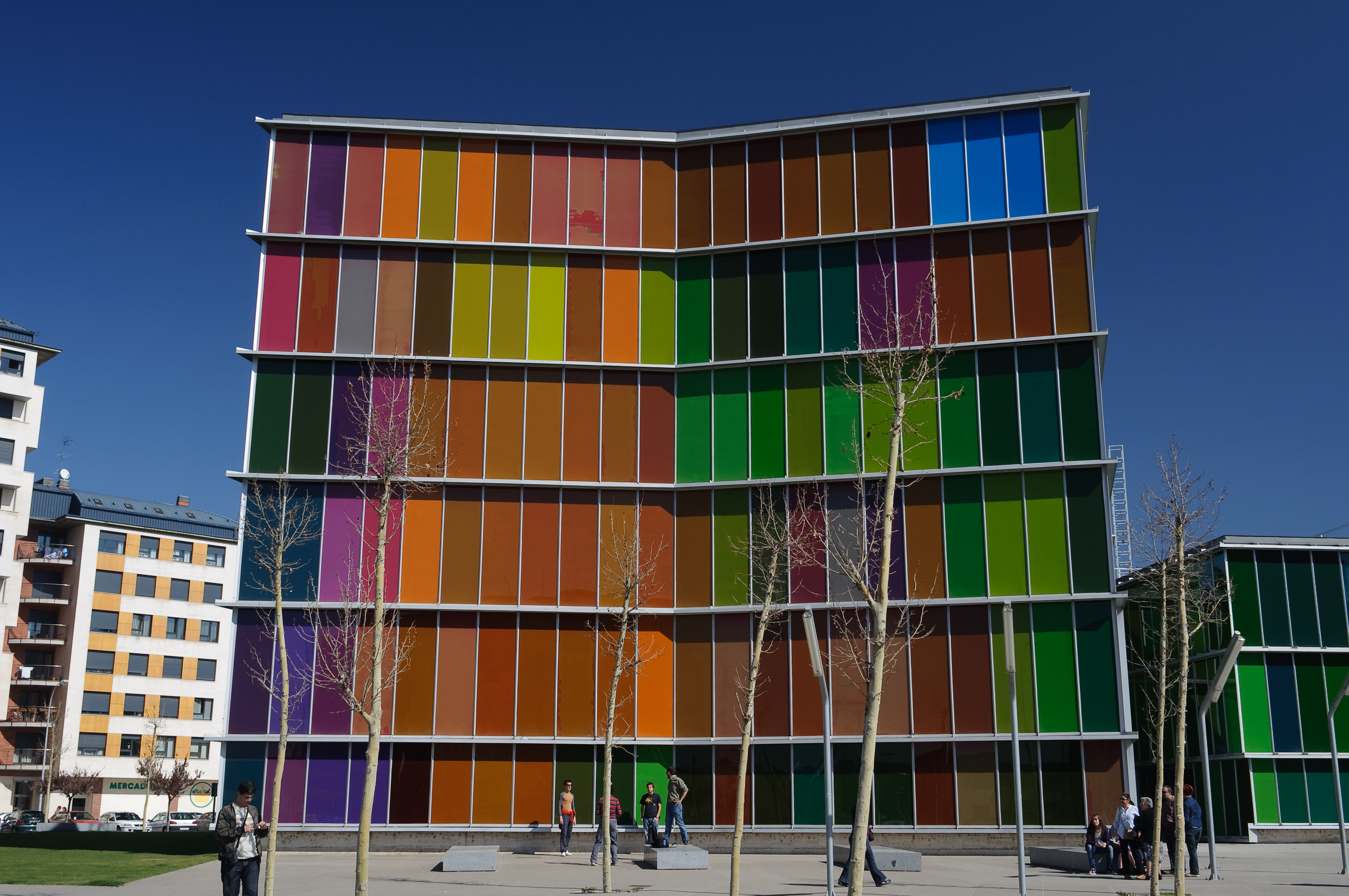 MUSAC